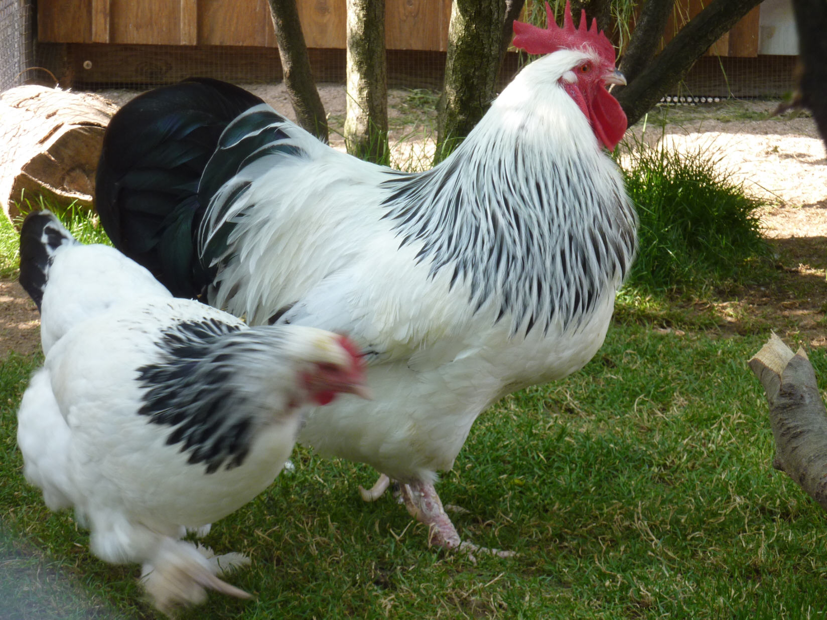 Sundheimer